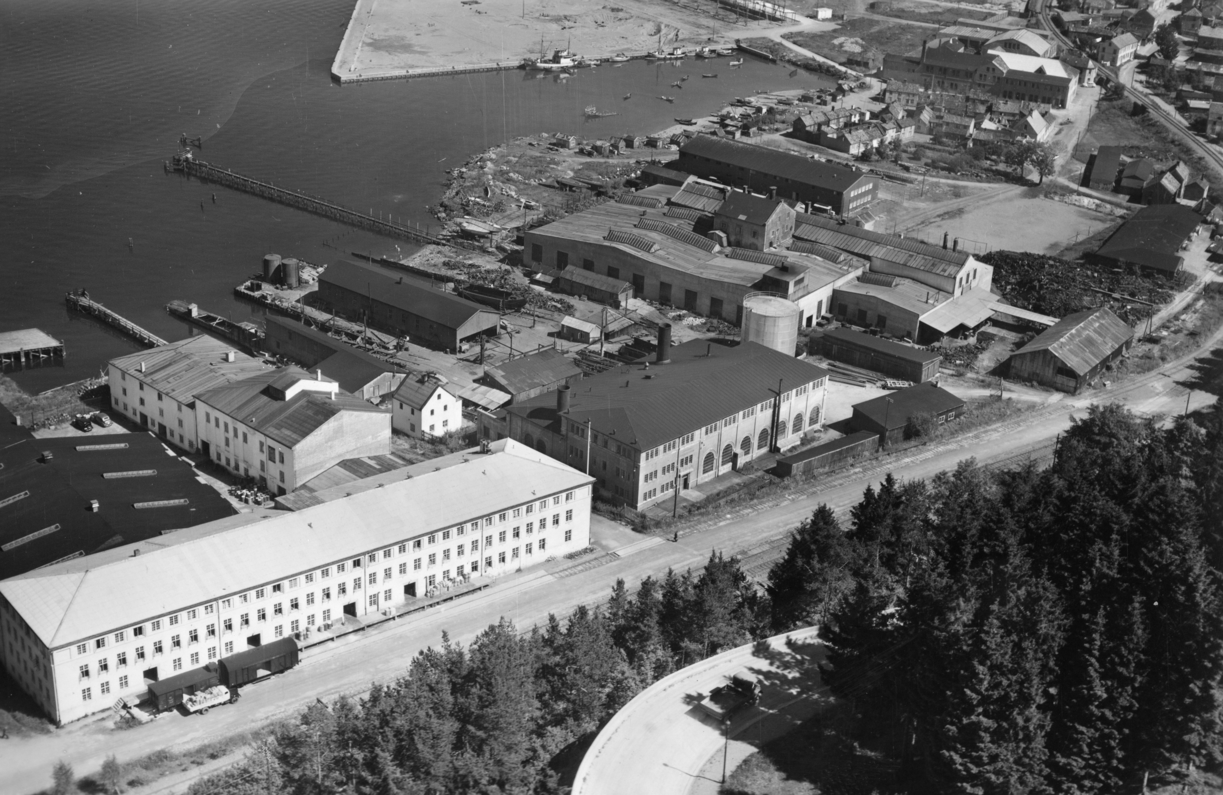 Format: Fotopositiv Dato / Date: Ukjent Fotograf / Photographer: Widerøe's Flyveselskap og Polarfly A/S Oslo Sted / Place: Trondheim Eier / Owner Institution: Trondheim byarkiv, The Municipal Archives of Trondheim Arkivreferanse / Archive reference: Tor.H46.B05.F22906 Merknad: Privatarkiv etter Laurits Olav Moxnes (1889 - 1975) donert Byarkivet av Ragnhild M. Steineke (2013) Ilens Skipsverft. Flyfoto. Tekst bakside: Frigitt av FORSVARSSTABEN til internt bruk for A/S Ørens mek. Verksted.